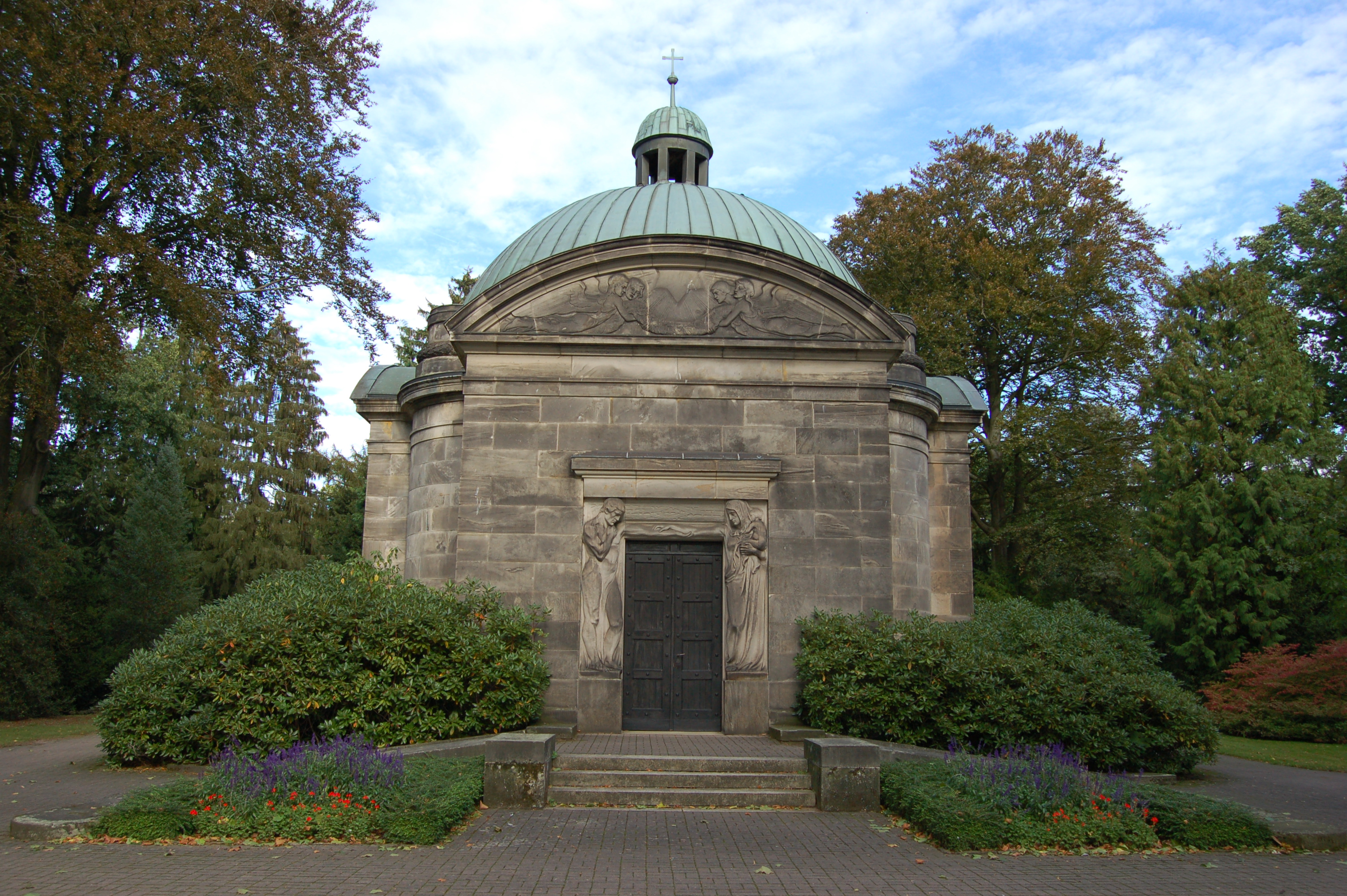 Die Kapelle des Nordfriedhofs in Minden, Nordrhein-Westfalen.